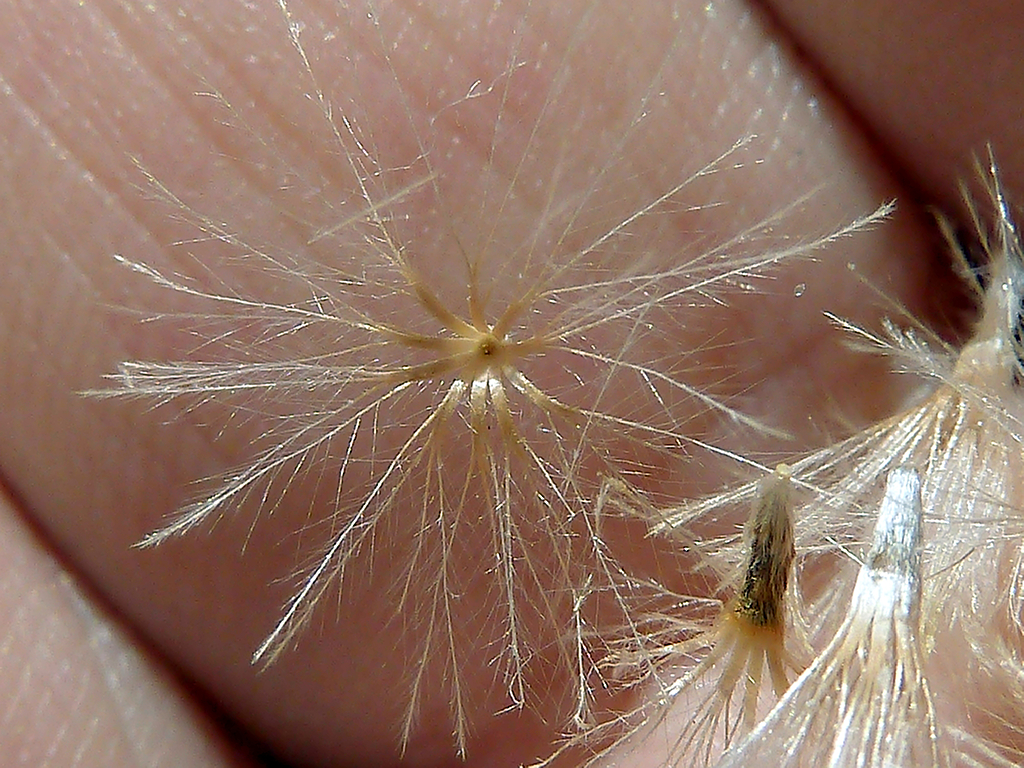 Carlina corymbosa (cardo cuco) : Cipselas sueltas, de cuerpo densamente seríceo y vilano con una fila de cerdas plumosas fusionadas en fascículos por sus bases. - Circa cementerio, a lo largo de la circumvalación norte, Águilas (Murcia, España)..